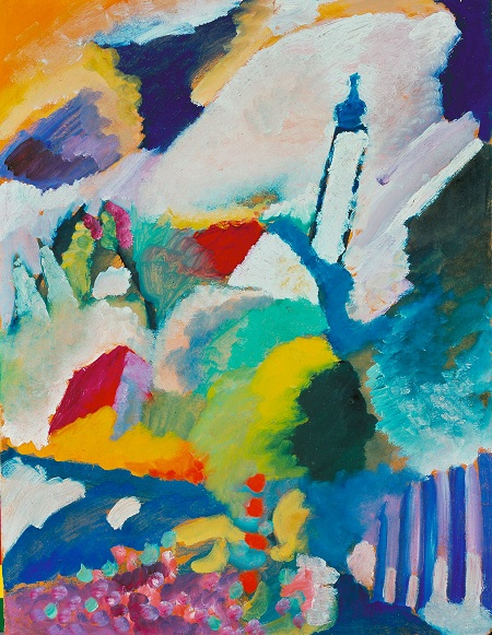 Wassily Kandinsky: Murnau mit Kirche I, 1910, Öl auf Pappe, 64,7 x 50,2 cm. Lenbachhaus München